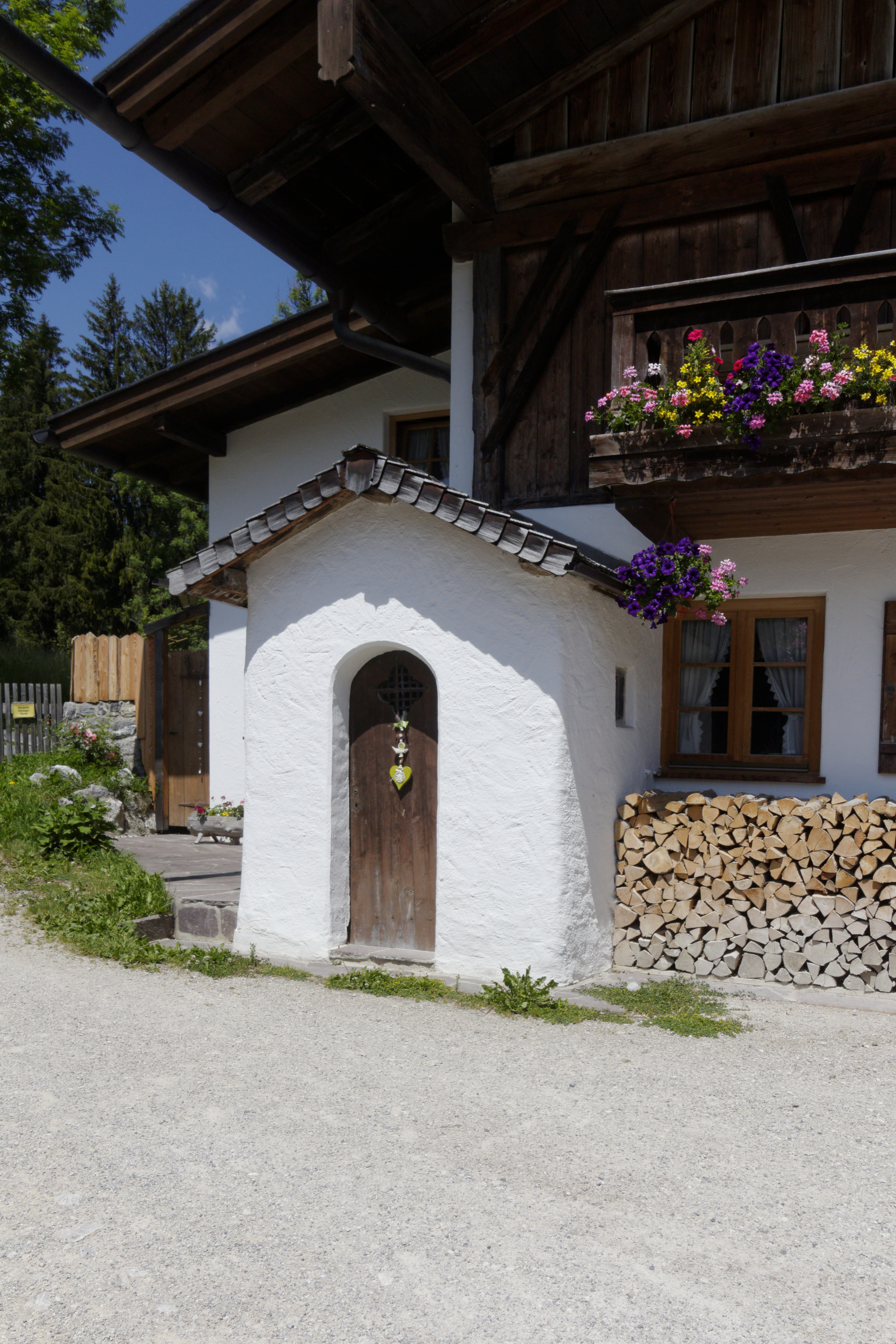 Krün-Barmsee (Obb.), Am Barmsee 7; Hauskapelle